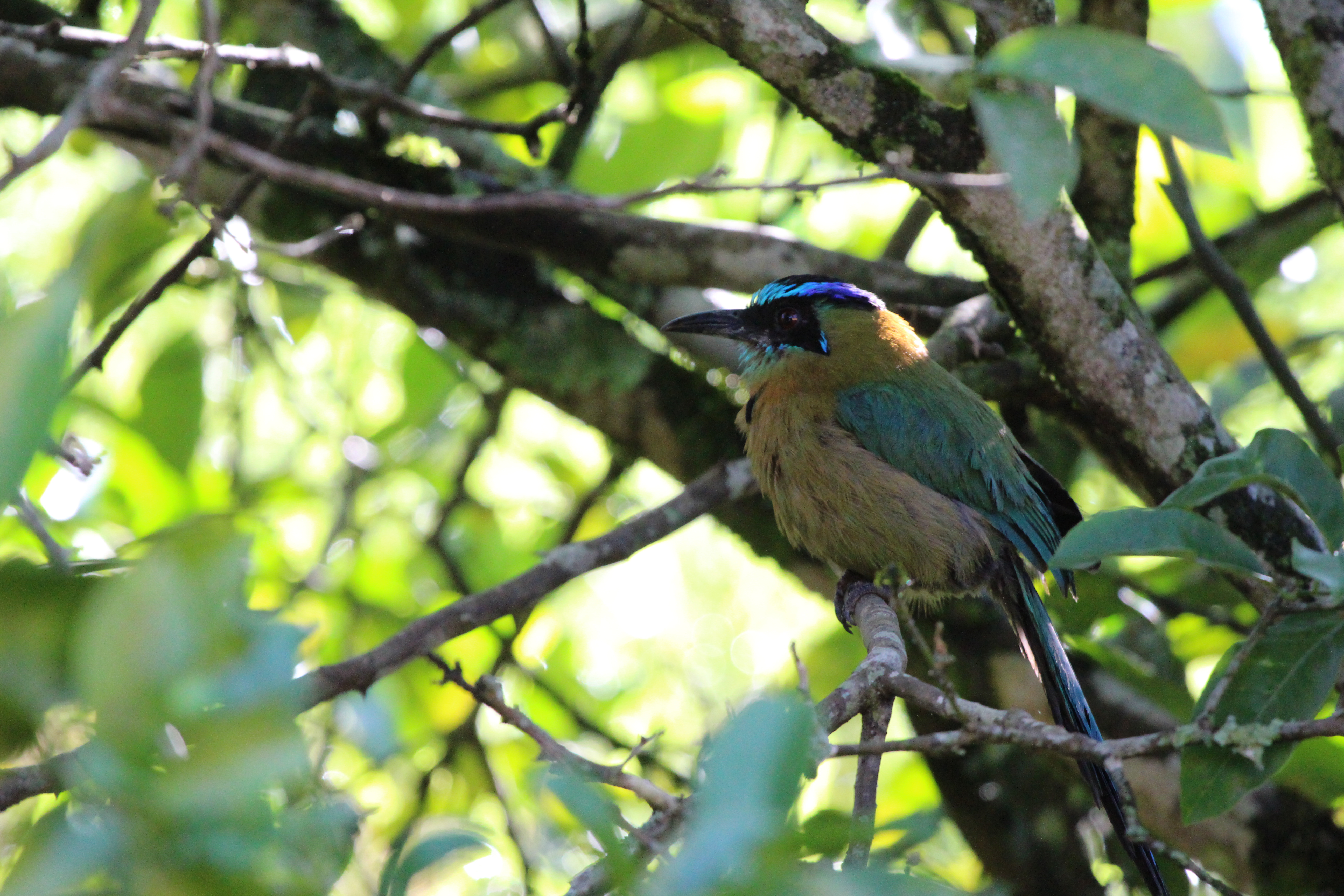 Momot caraïbe au Costa Rica a la forêt de nuage Costa Rica. 1400 msnm